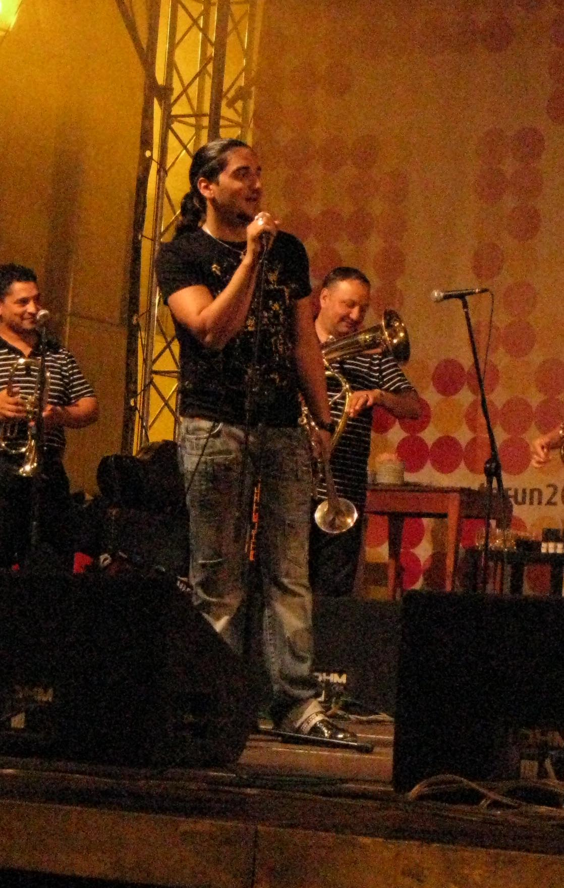 Marko Marković na koncercie Boban i Marko Marković Orkestar w Toruniu